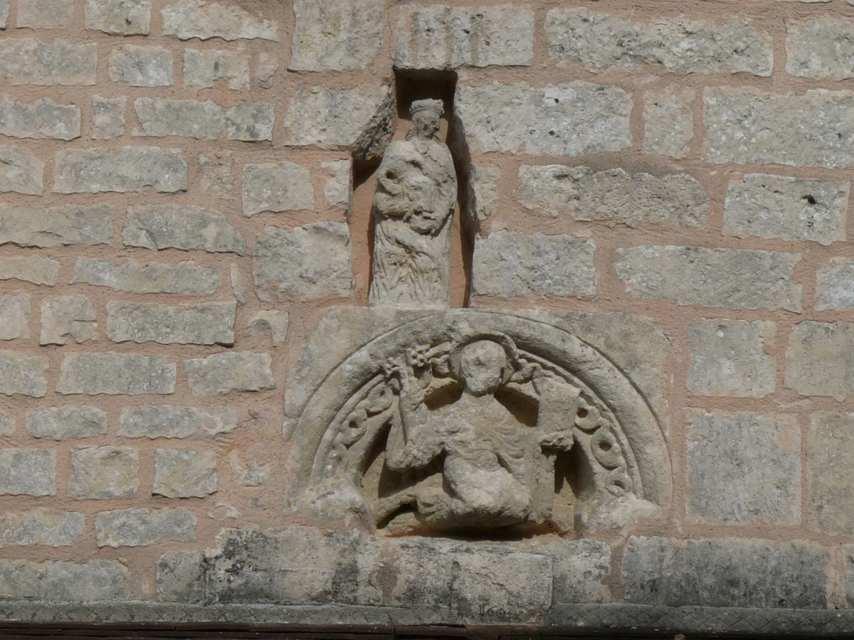 Façade église de Douzat, Charente, France